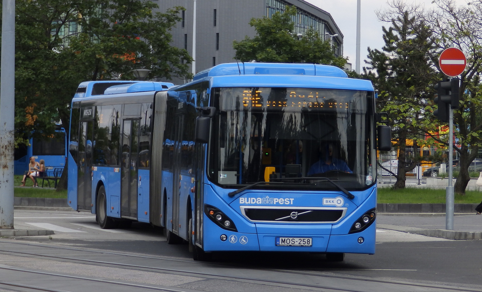 84E busz a Határ úti végállomásánál